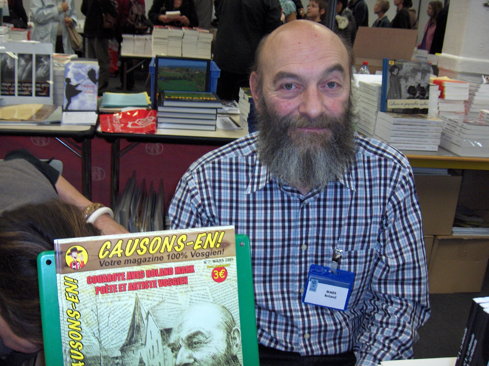 Roland Marx, poète vosgien, au 18ème Festival international de géographie de Saint-Dié des Vosges (France)